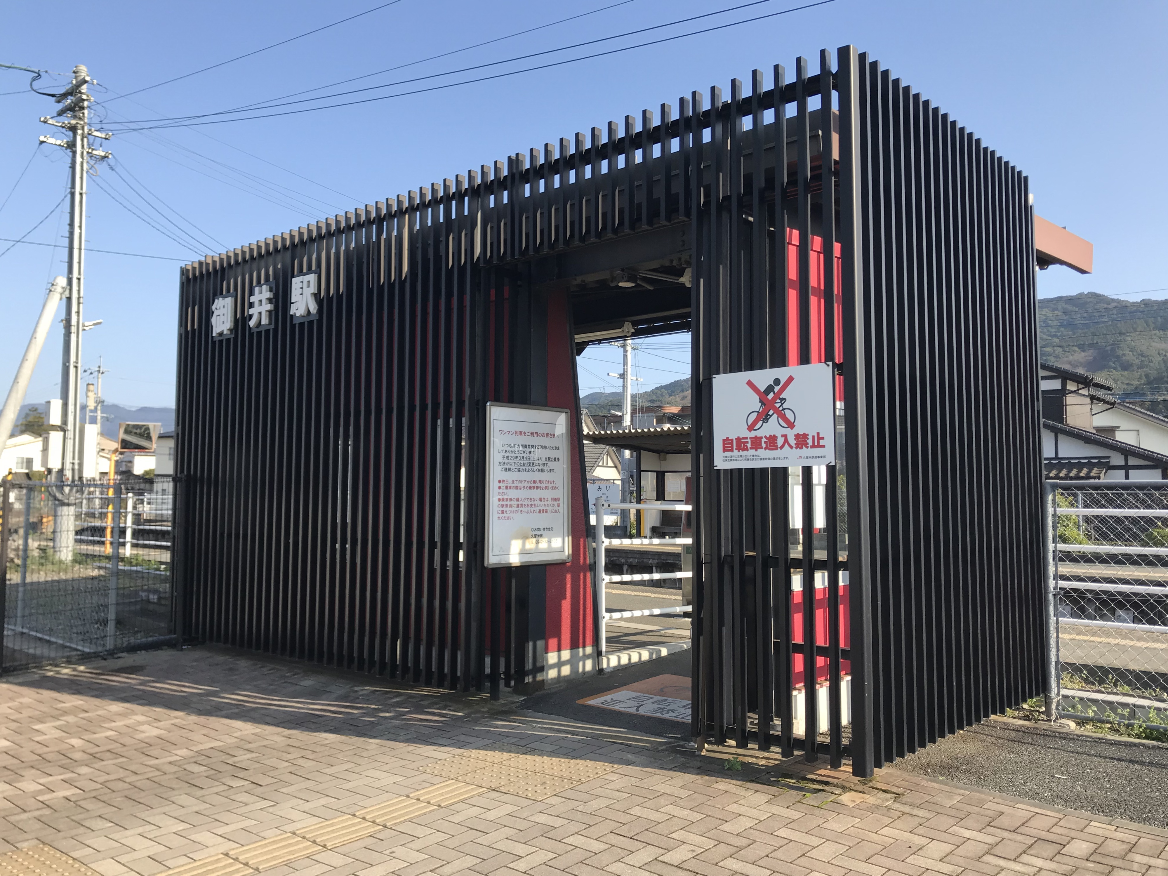 御井駅の駅舎